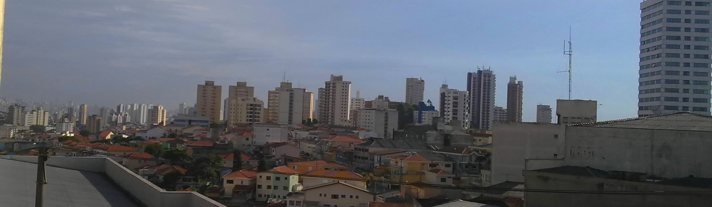 Panorama do distrito do Tucuruvi, Zona Norte de São Paulo